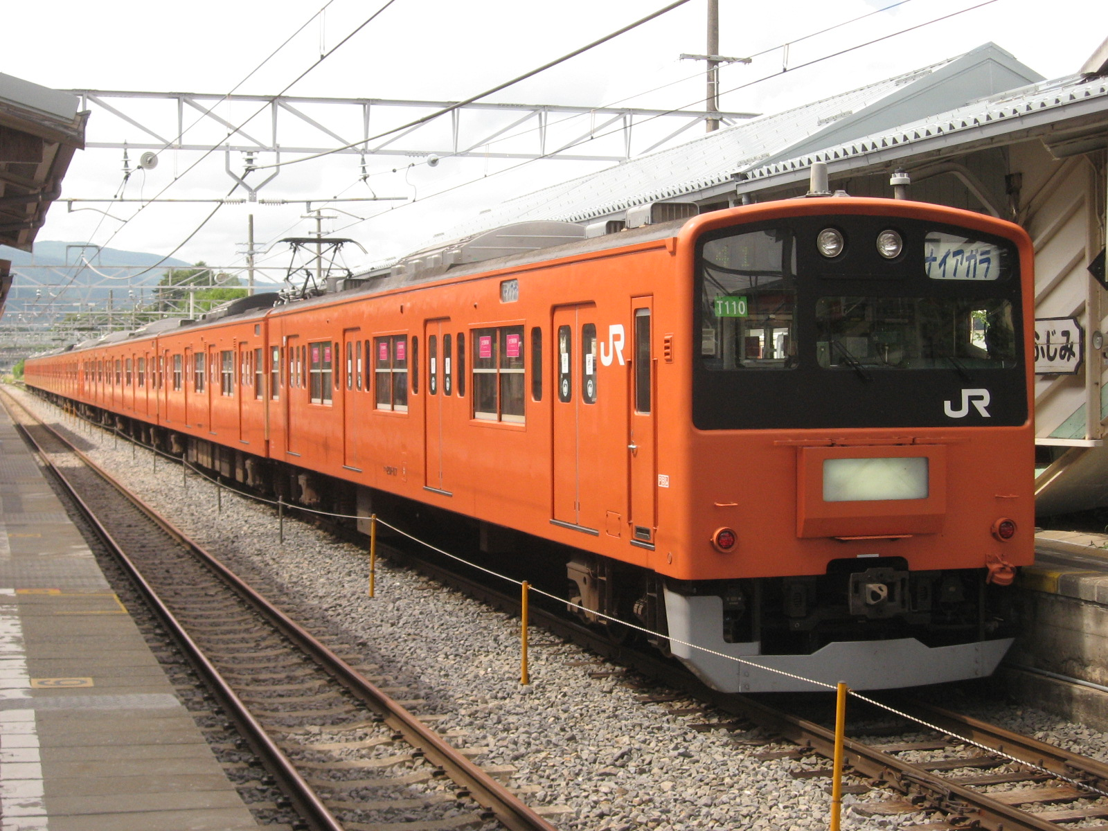 201系の諏訪湖花火臨「臨時快速 ナイアガラ1号」（トタT110編成） 廃車回送を兼ねた最後の貸出しとなった（2007年9月1日、信濃境にて） 方向幕も特別仕様となった